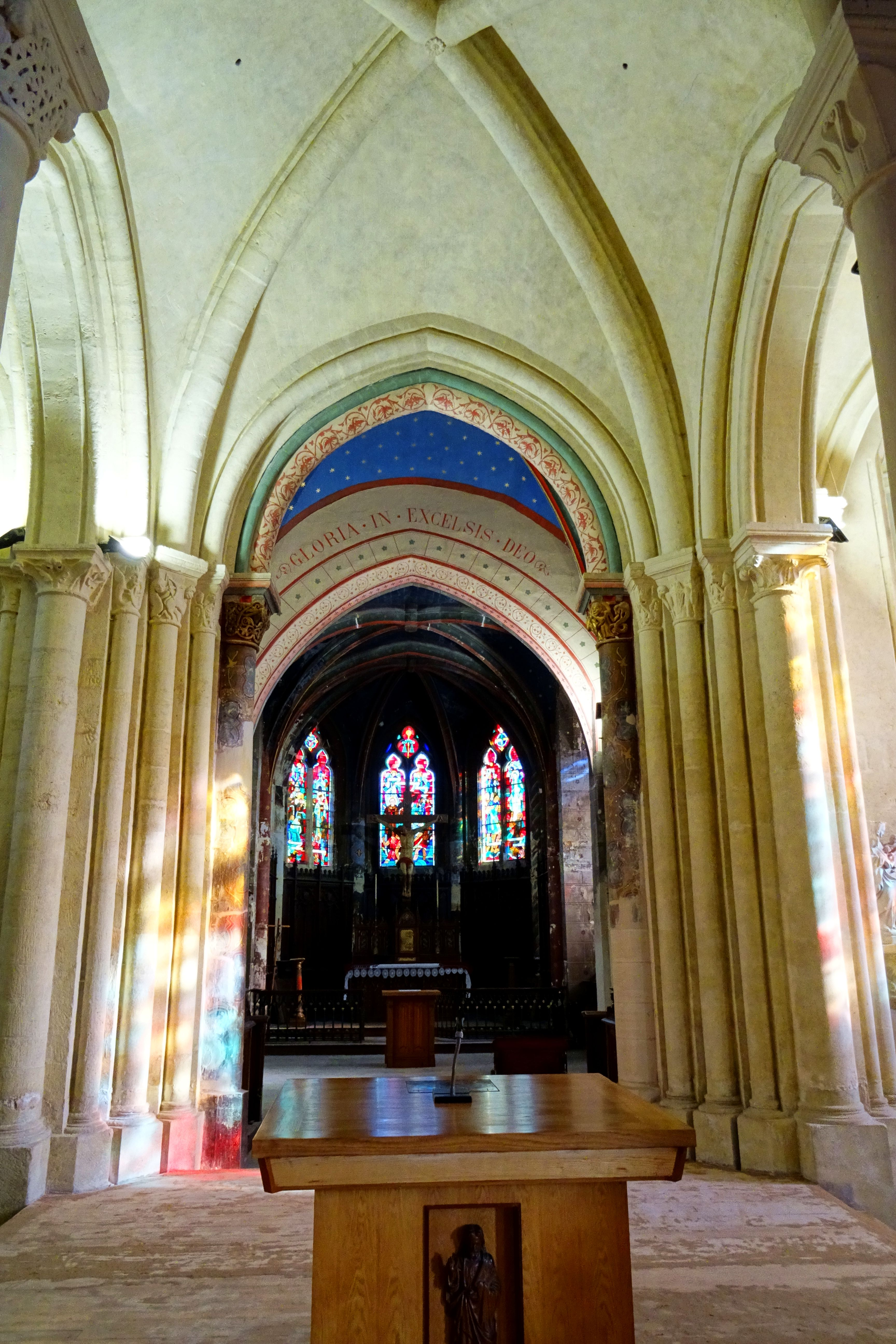 Intérieur de l'église - voir le titre du fichier.